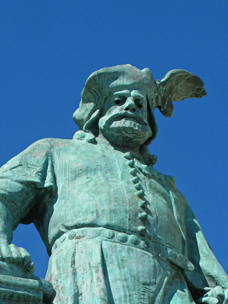 Kálmán szobra a Hősök téri Millenniumi emlékművön, Budapesten